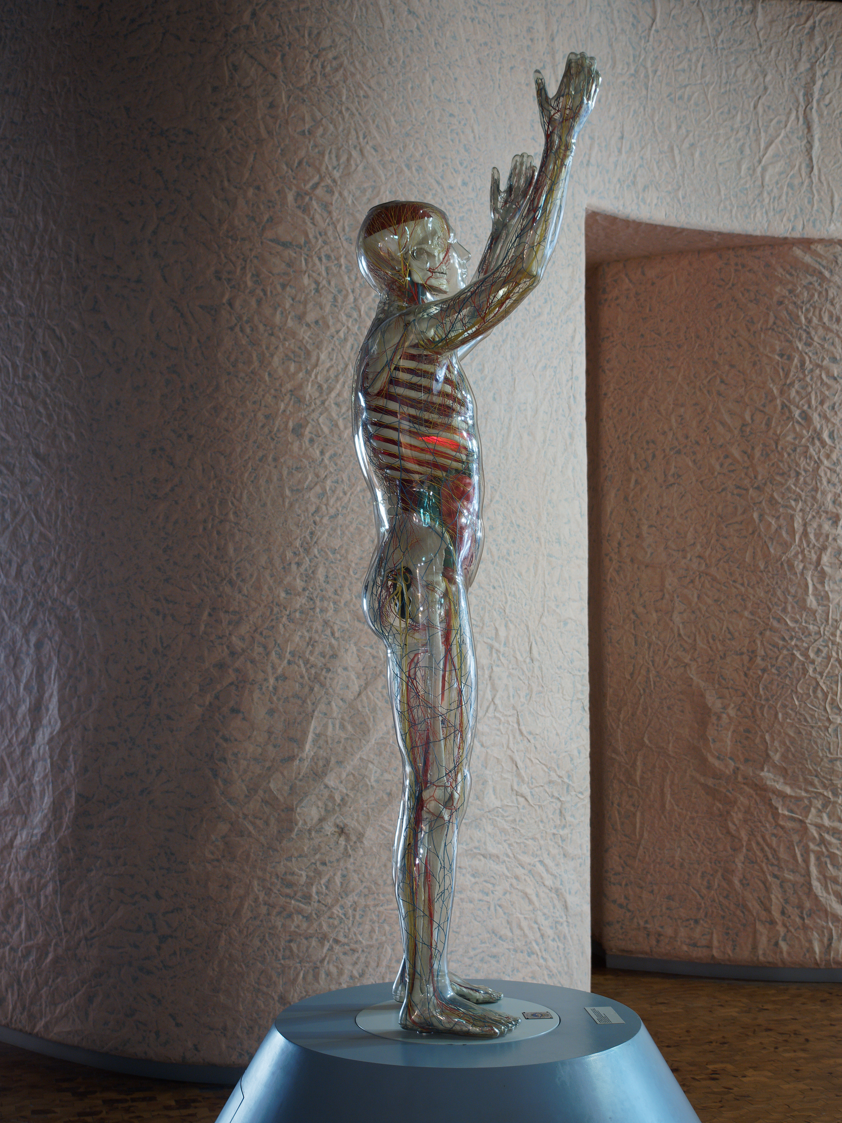 Dortmund, gläserner Mensch mit der Nachbildung der Organe, Blutgefäße (rot, blau) und Nerven (gelb) in der DASA (Deutsche Arbeitsschutz Ausstellung). Ansicht von der rechten Seite, beleuchtet: die Milz. Die rechte Körperhälfte enthält Arterien, Nerven und das Hauptvenennetz, die linke Körperhälfte Arterien und Venen. Die inneren Organe leuchten verschiedenfarbig in nachstehender Reihenfolge auf: Gehirn, Kehlkopf, Schilddrüse, Lungen, Herz, Milz, Magen, Bauspeicheldrüse, Leber, Gallenblase, Dünndarm, Blinddarm, Dickdarm, Mastdarm, Nieren, Harnblase. Hergestellt in der Lehrmittelfabrik GmbH im Deutschen Hygiene-Museum 1992.